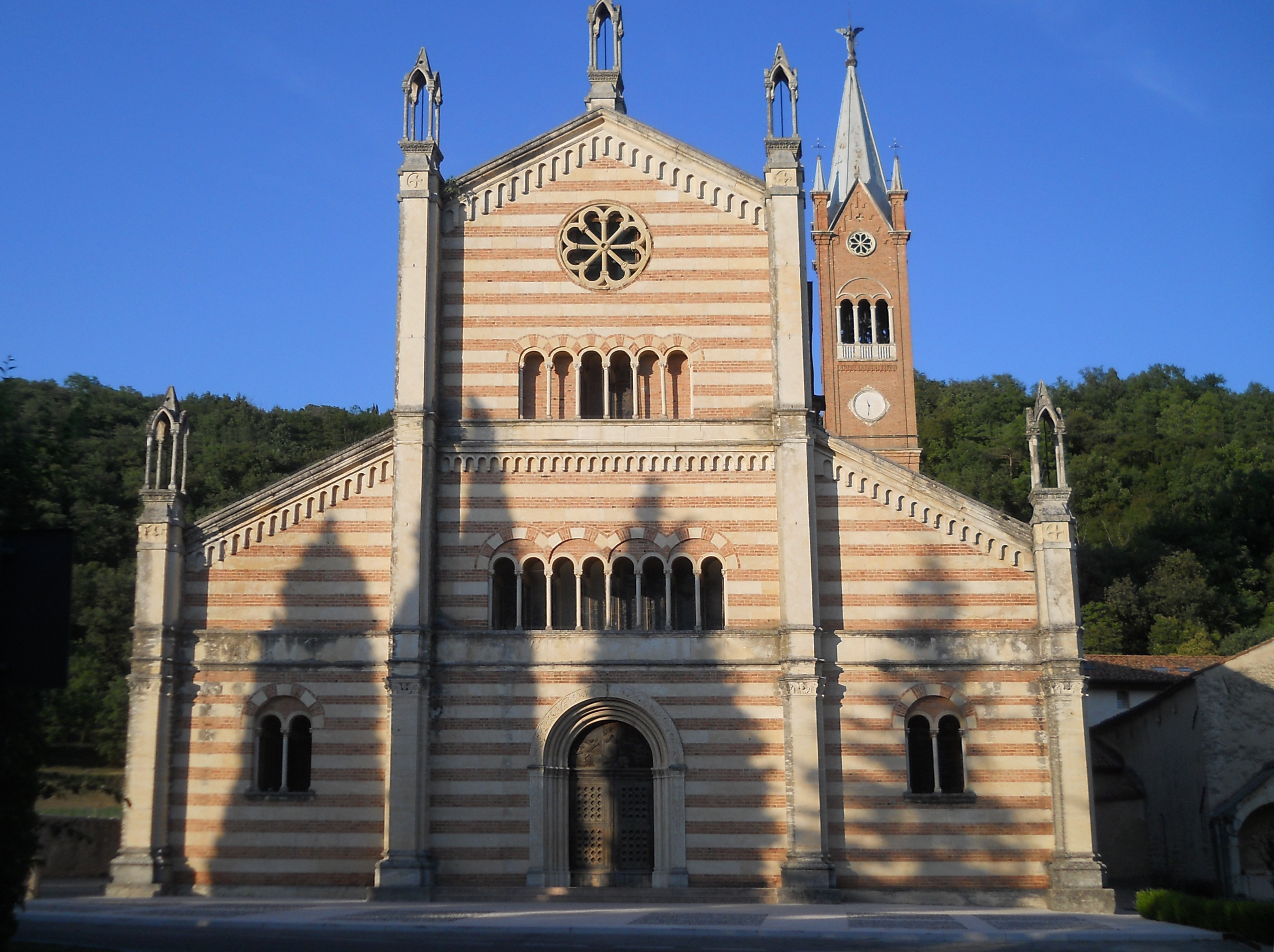 Chiesa parrocchiale di Tregnago (provincia di Verona)